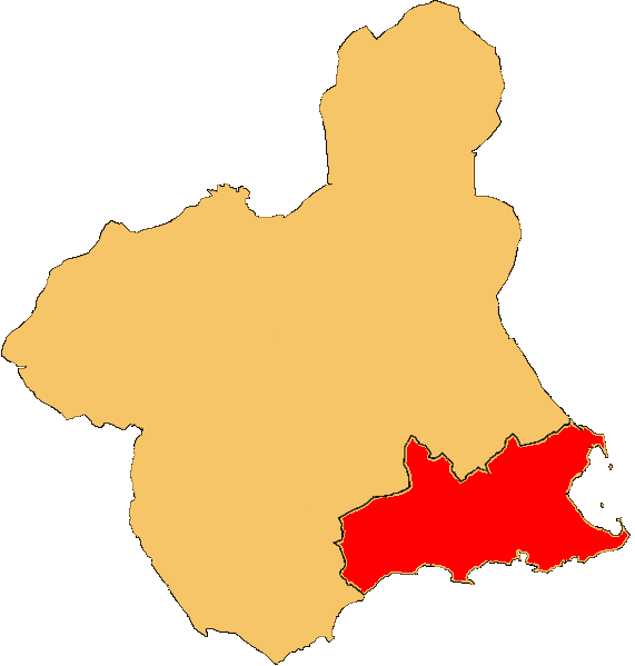 Campo de Cartagena, Spain Situación geografica del Campo de Cartagena